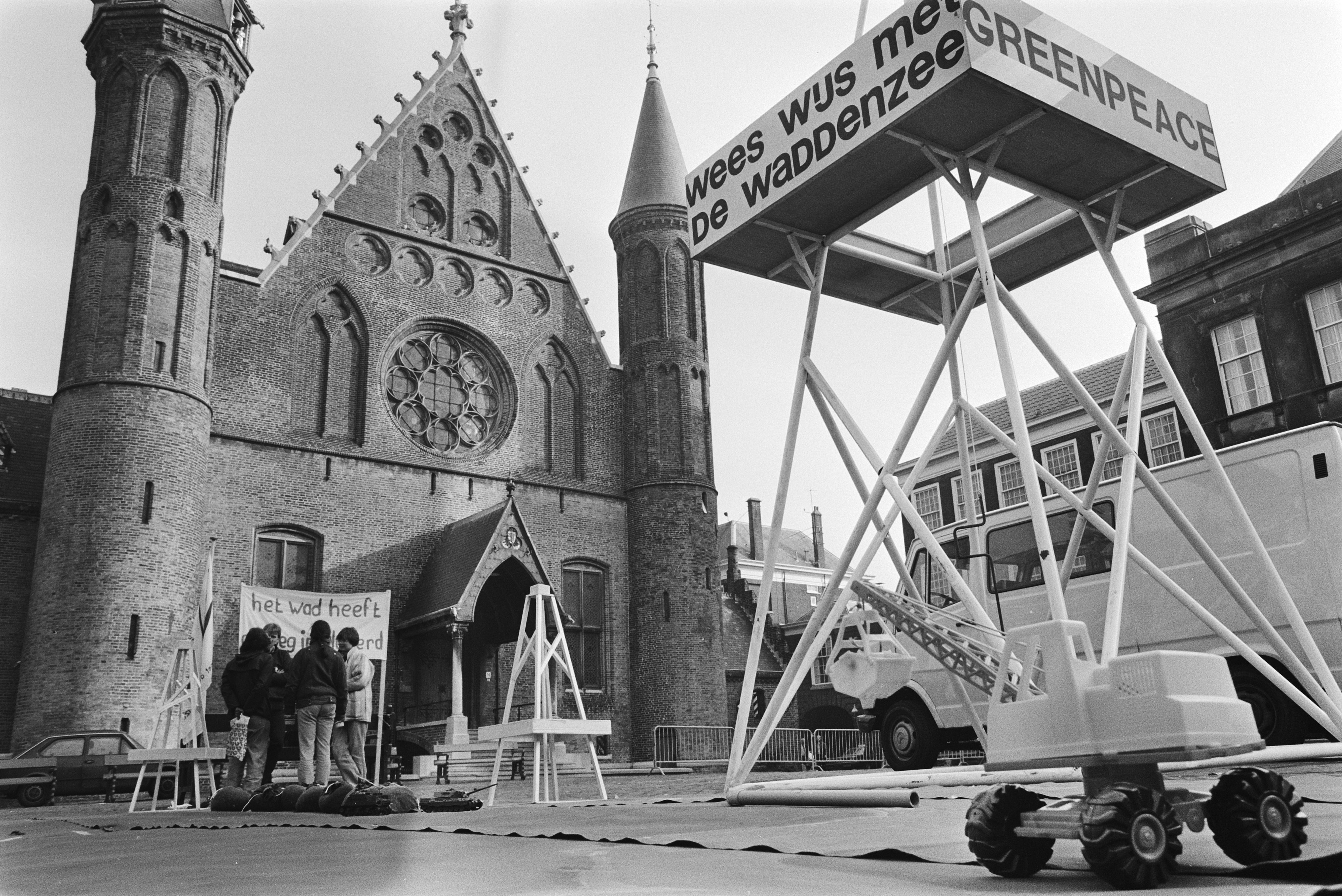 Collectie / Archief : Fotocollectie Anefo Reportage / Serie : [ onbekend ] Beschrijving : Waddenvereniging en Greenpeace demonstreren op het Binnenhof met nagebouwde boortorens tegen de plannen voor oliewinning in het Waddengebied Datum : 8 november 1983 Locatie : Binnenhof, Den Haag, Zuid-Holland Trefwoorden : betogingen, milieubeleid, milieubeweging Fotograaf : Croes, Rob C. / Anefo Auteursrechthebbende : Nationaal Archief Materiaalsoort : Negatief (zwart/wit) Nummer archiefinventaris : bekijk toegang 2.24.01.05 Bestanddeelnummer : 932-7641